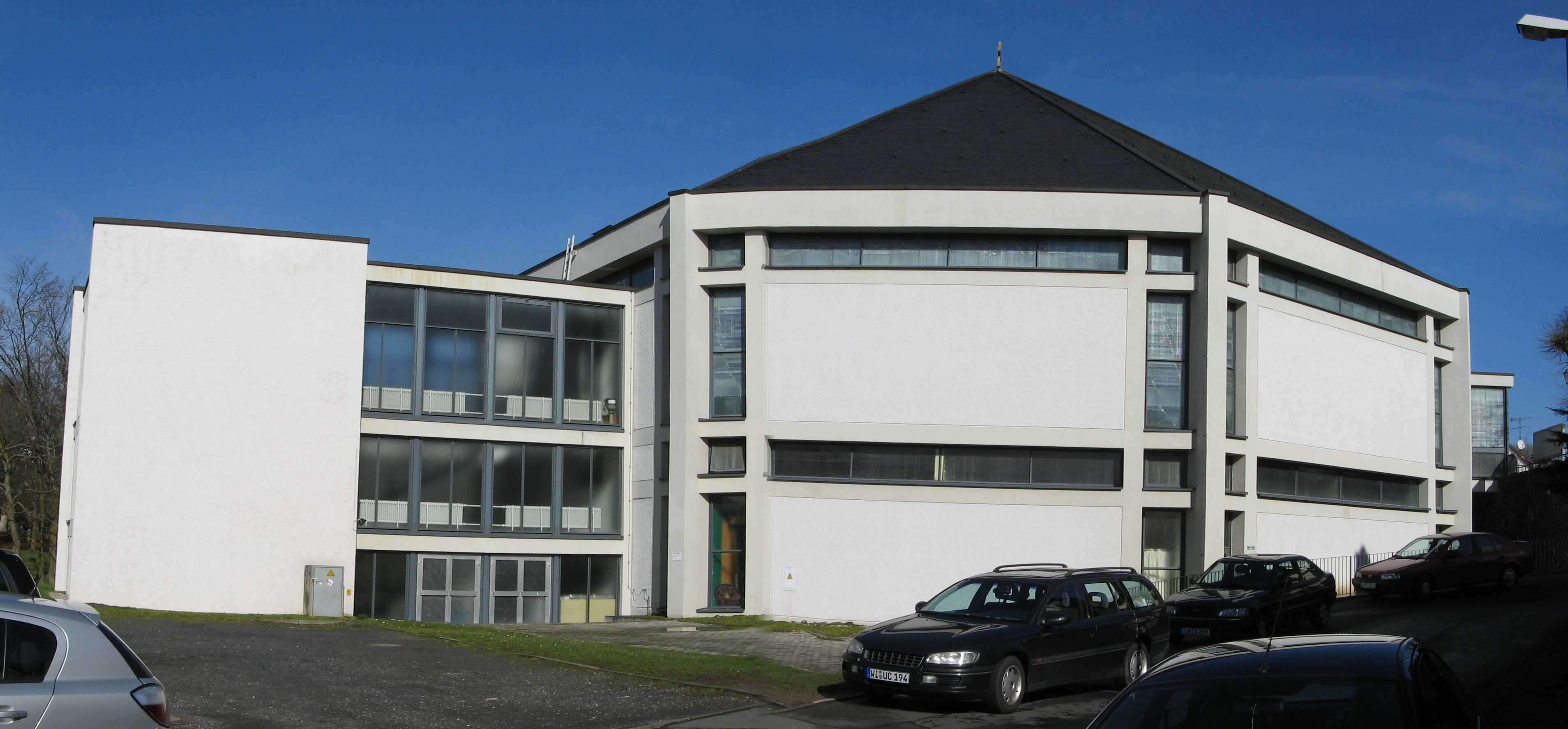 Neue Kirche St. Johannes der Täufer in Lahr, Waldbrunn (Westerwald), Hessen, Deutschland